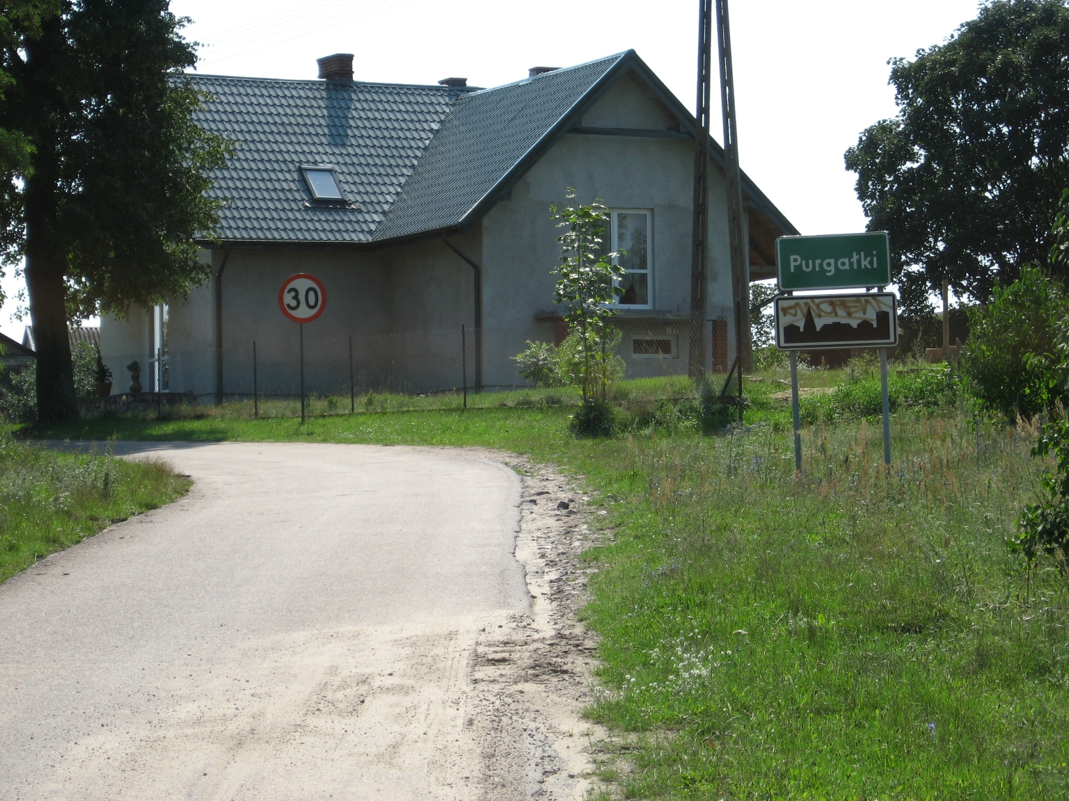 Purgałki